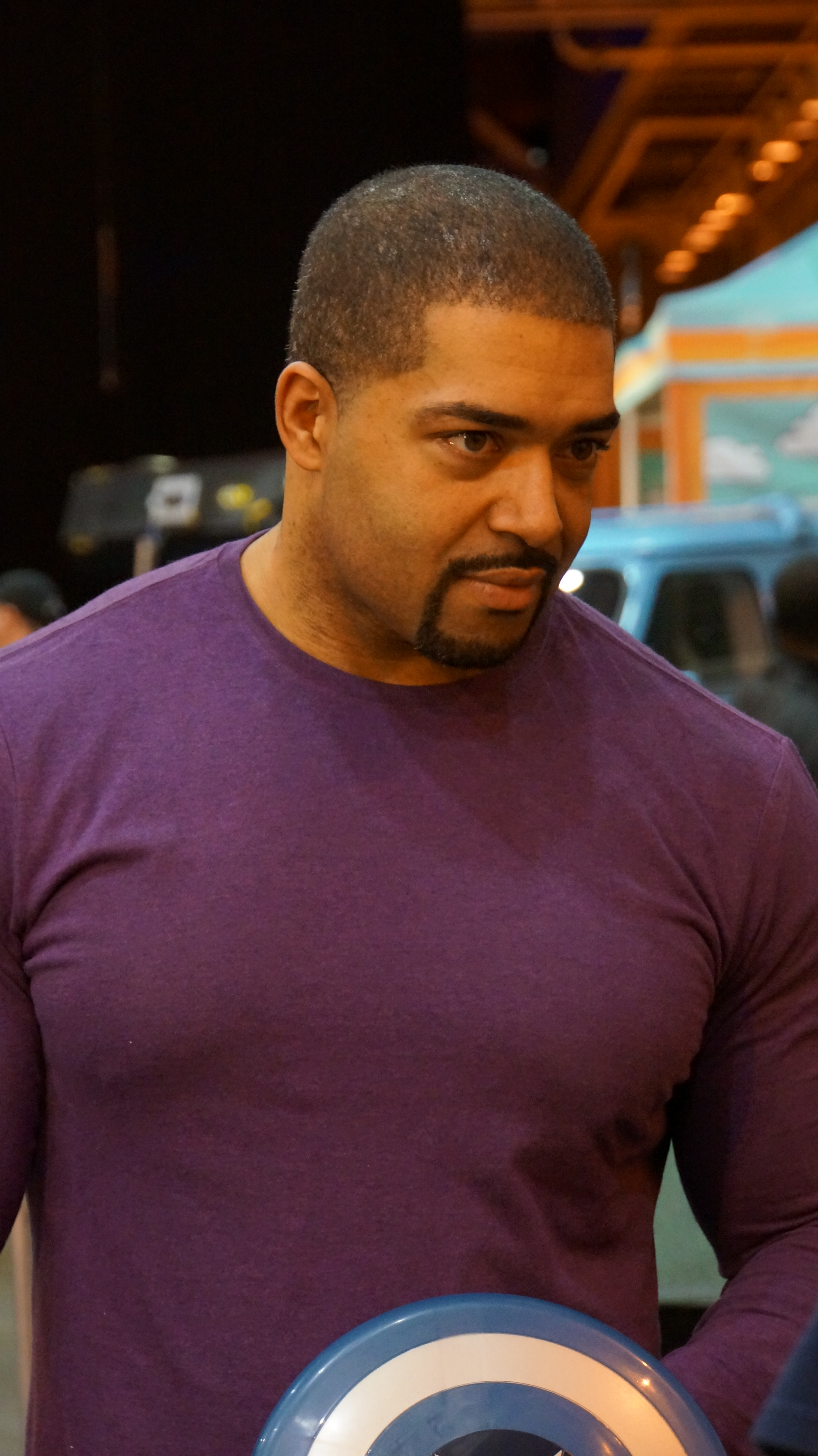 2014-04-04_18-52-58_NEX-6_DSC07329